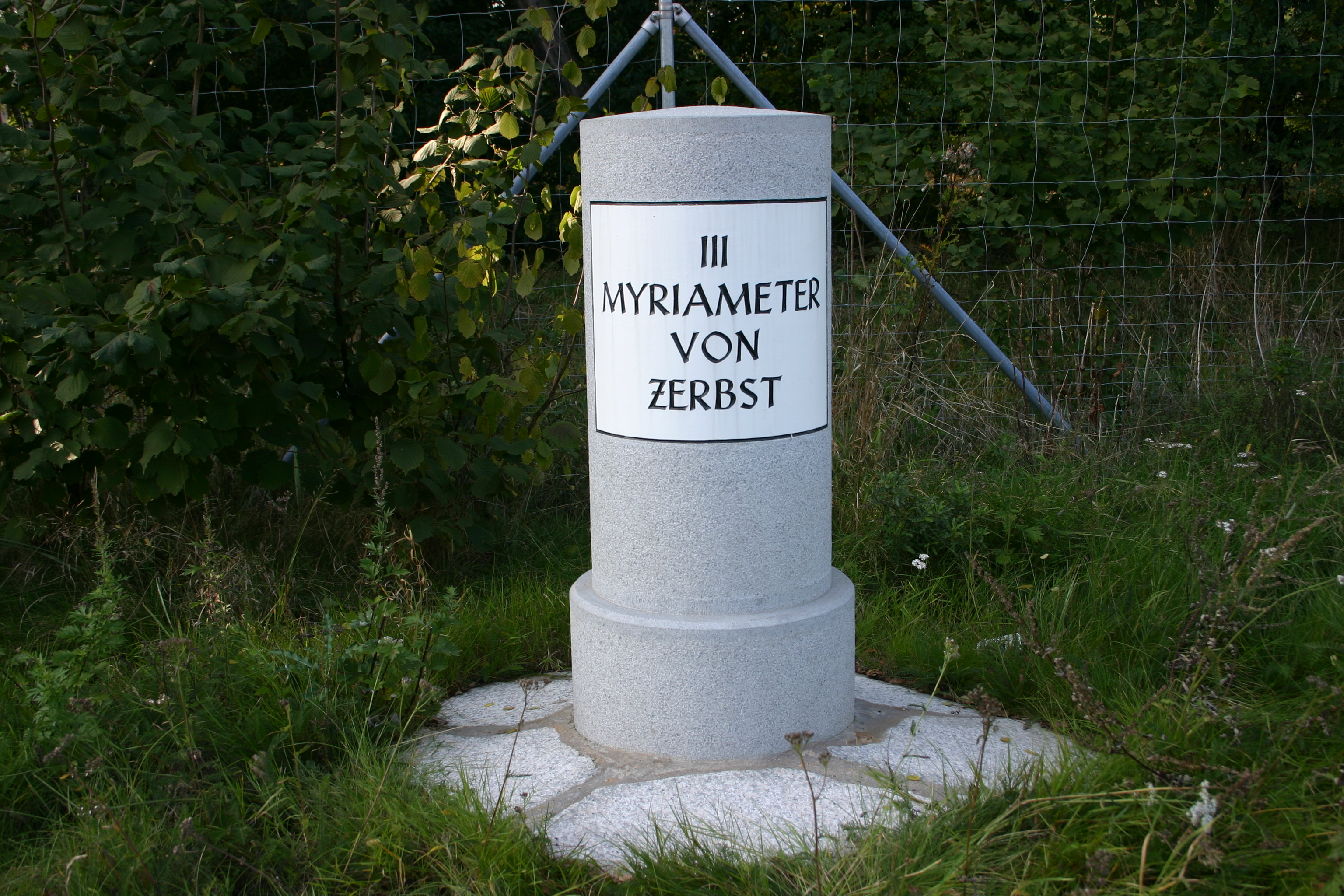 Ein Myriameterstein mit der Angabe 3 Myriameter von Zerbst. Der Stein steht an der Autobahnabfahrt A9 Köselitz.